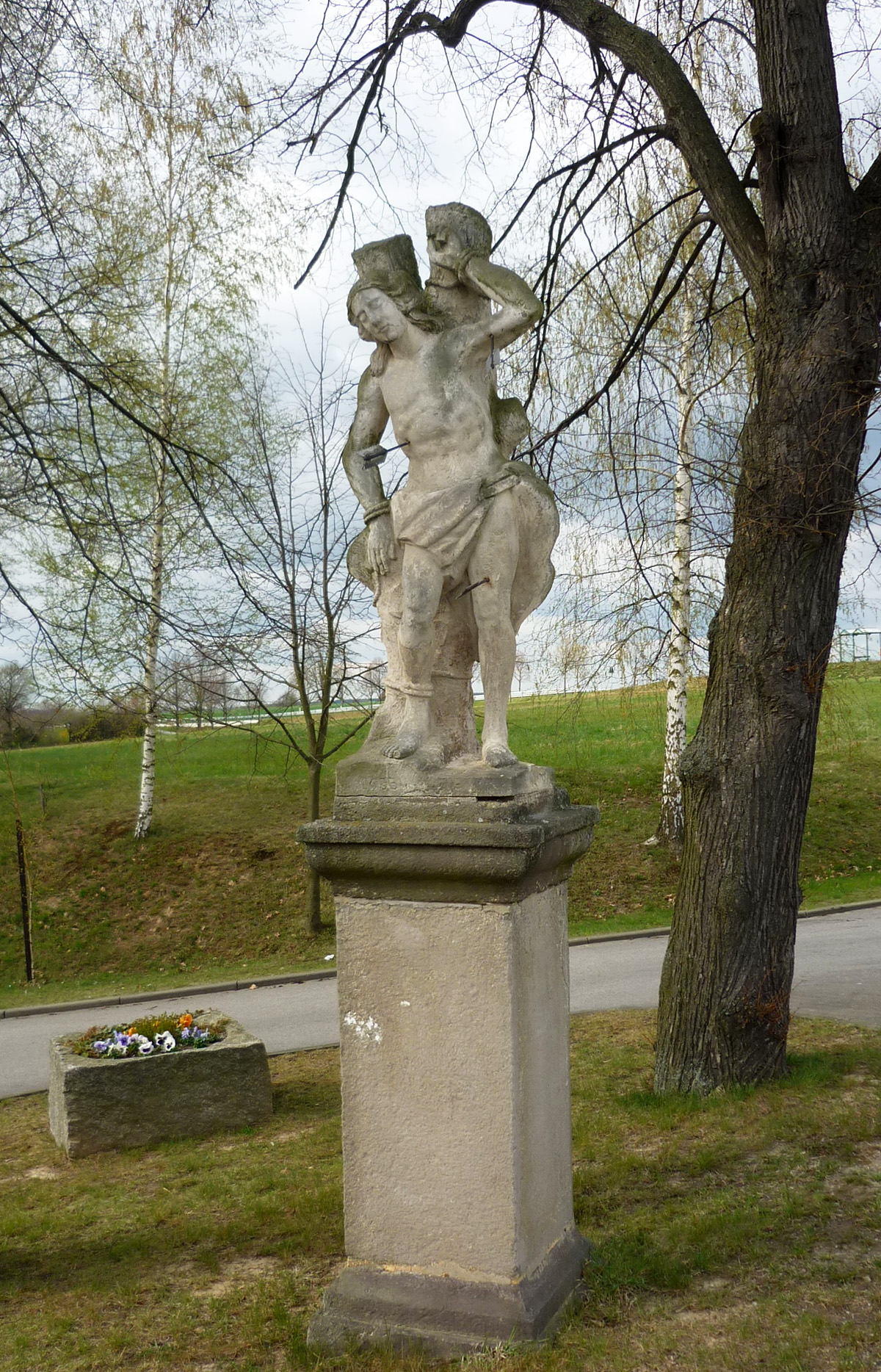 Bildstock Hl. Sebastian in Schweinerden (Panschwitz-Kuckau) Hornjoserbsce: Stołp swj. Bosćija w Swinjarni